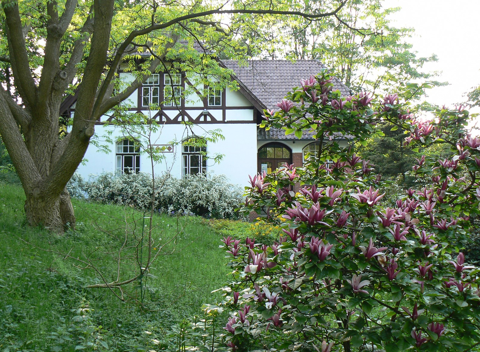 Alter Botanischer Garten Kiel: Blick auf das ehemalige Haus des Garteninspektors - heute Literaturhaus Schleswig-Holstein.